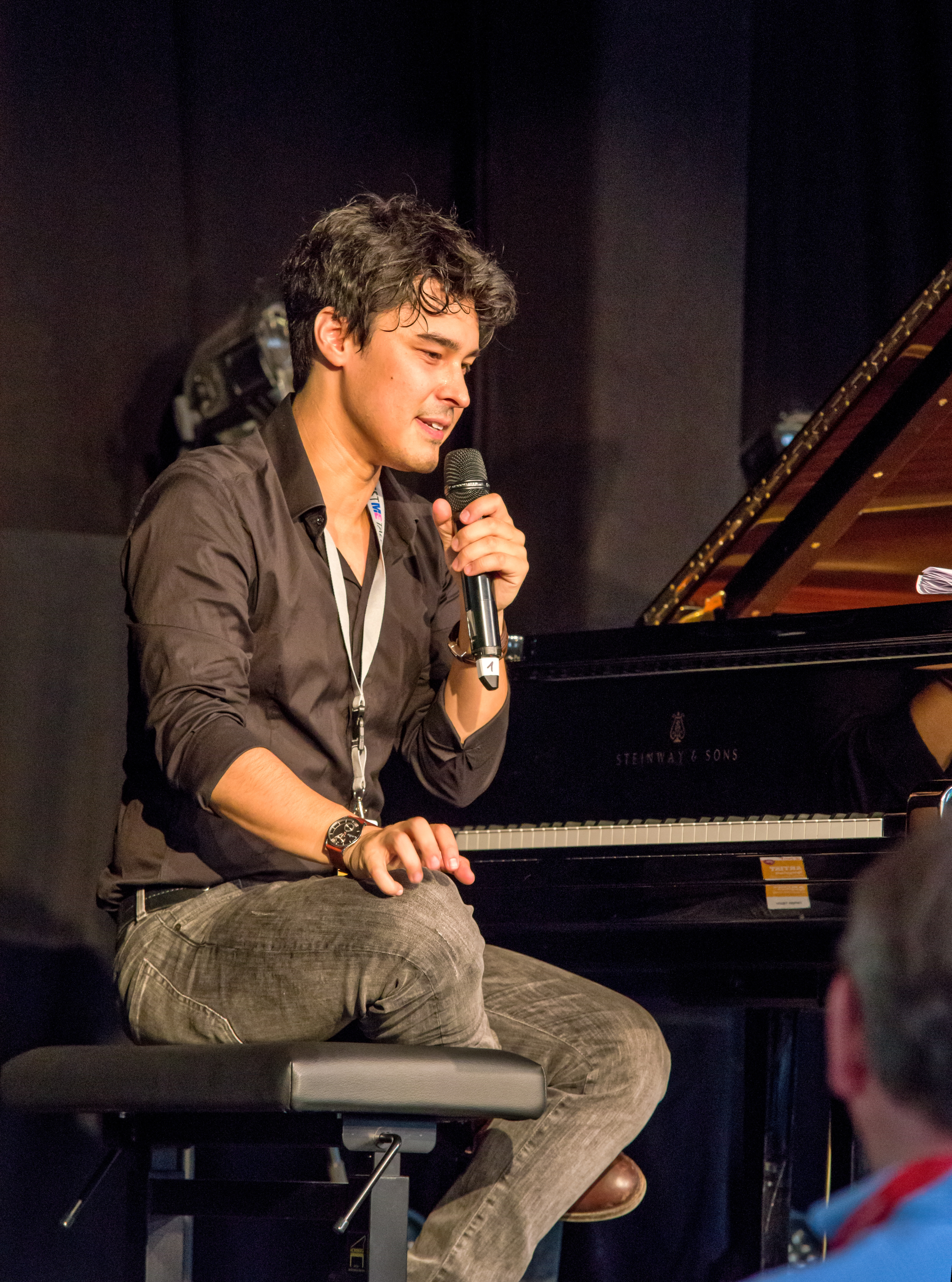 Bilder vom Zelt Musik Festival 2017 in Freiburg im Breisgau Klassikmatinee am 23. 07. 2017 mit Christopher Park